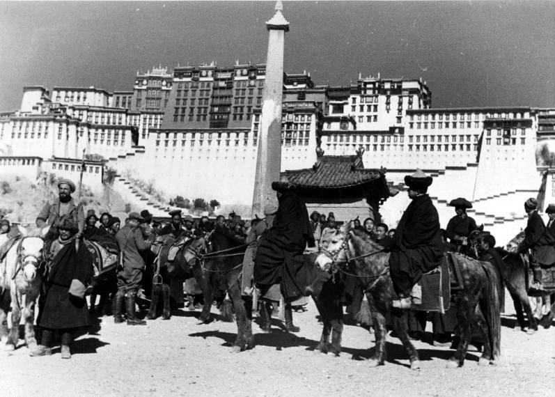 Lhasa, Potala